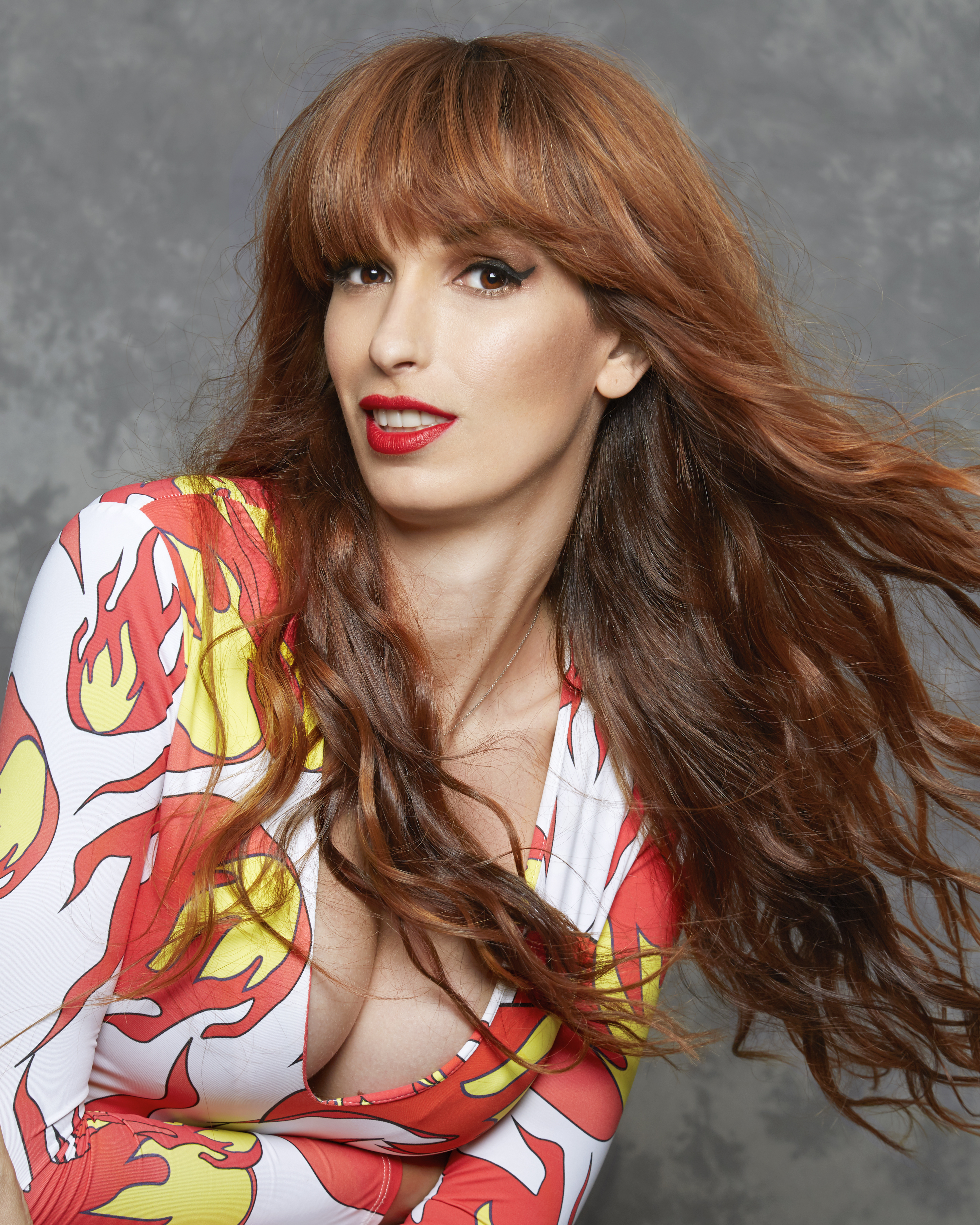 Retrato de Valeria Vegas. Realizdo por Torres Iborza, cediendo permiso absolutamente.